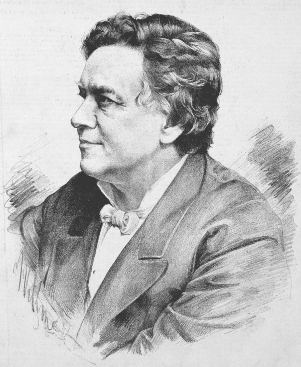 Portréty osobností od Jana Vilímka. František Karel Kolár (1829 - 1895) - herec, režisér a výtvarnik